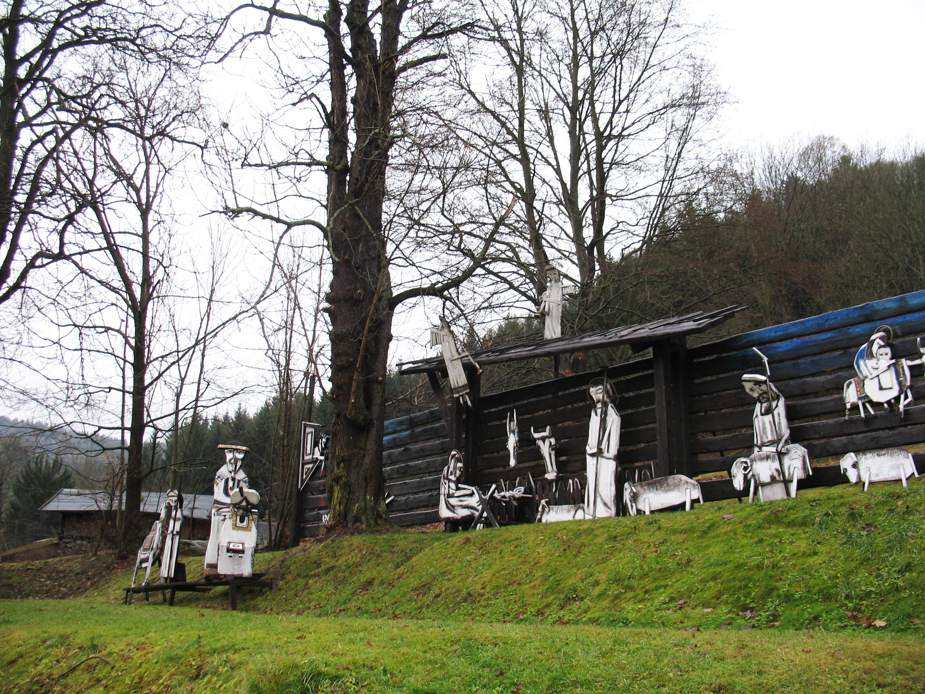 Betlém malíře Josefa Jíry